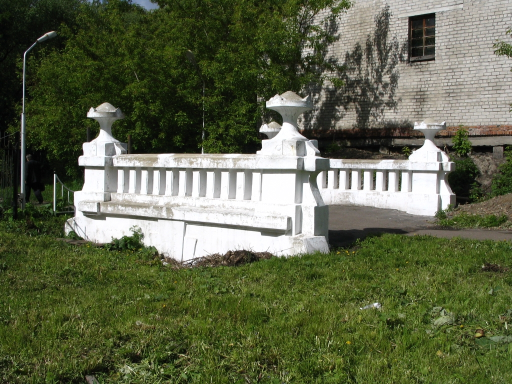 железобетонный мостик через Медичку. 2007 году